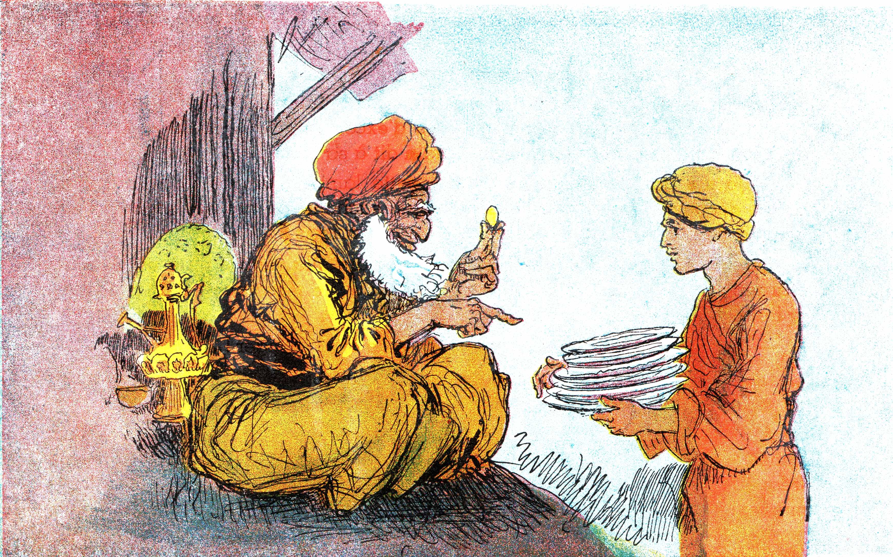 Aladin - illustré par Albert Robida - Paris - Imagerie merveilleuse de l'Enfance - Illustration de la page 4